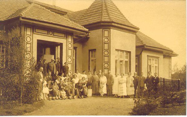 Abja linavabriku asjaajaja - direktor Mats Kissa häärber, rahvasuus tuntud kui Inseneri Loss.